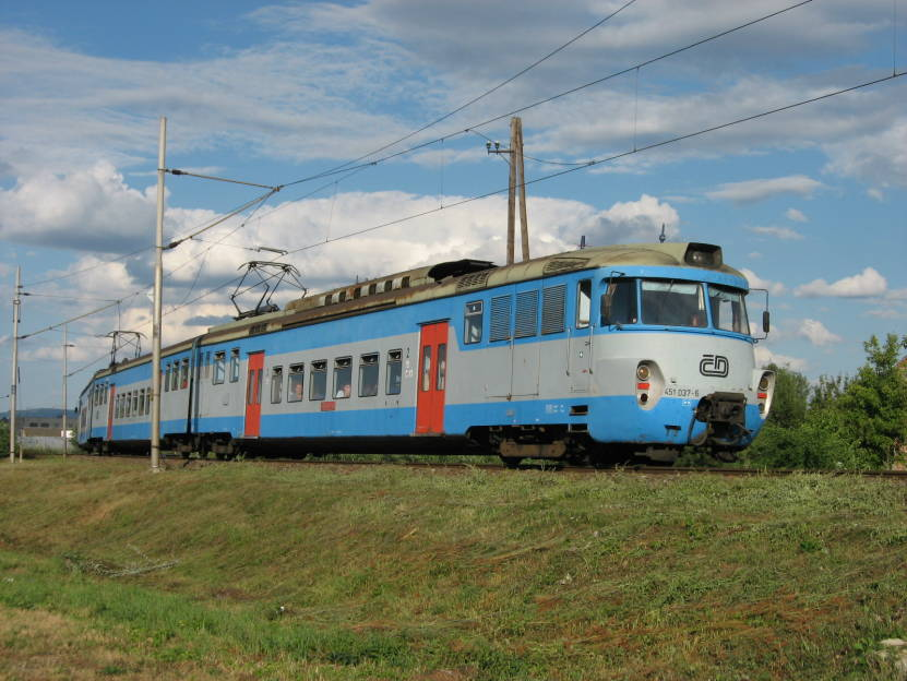 Vlak řady 451, Olomoucko